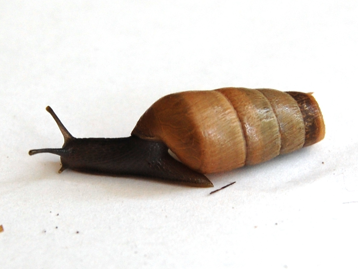 Rumina decollata